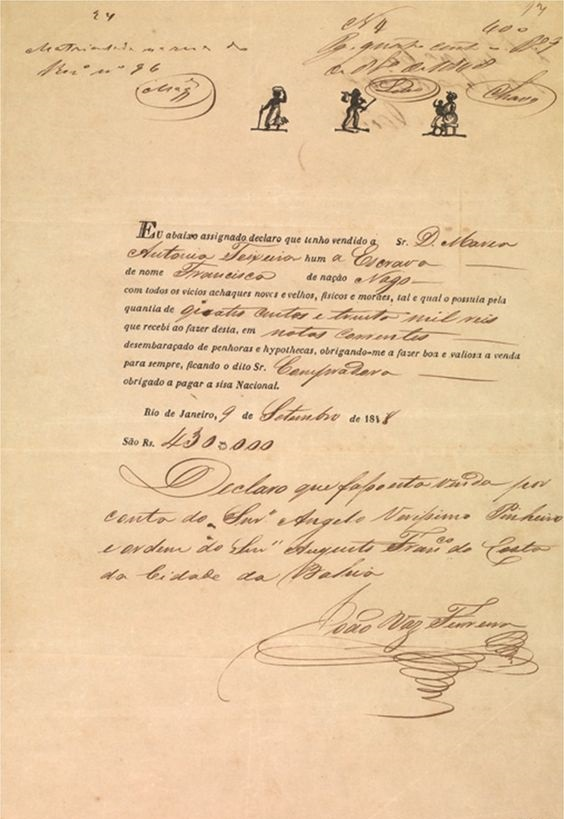 Recibo de venda da escrava nagô Francisca a Maria Antônia Teixeira, no valor de 430 mil réis. Fundo: Família Rego Martins Costa